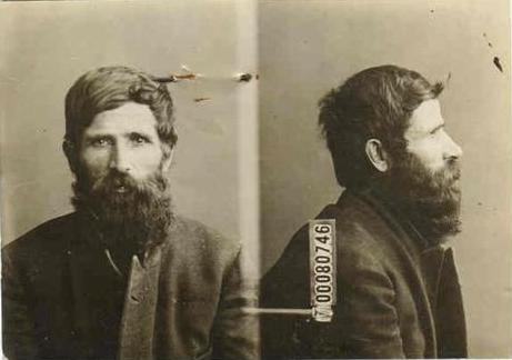 Antonio Ramón Ramón (Molvízar, 13 de noviembre de 1879 - Molvízar, 1924) fue un obrero español asociado con el movimiento anarquista, conocido por ser quien atentó contra el general chileno Roberto Silva Renard el 14 de diciembre de 1914, para vengar a su medio-hermano Manuel Vaca, muerto en la Matanza de la Escuela Santa María de Iquique, comandada por dicho militar en 1907.